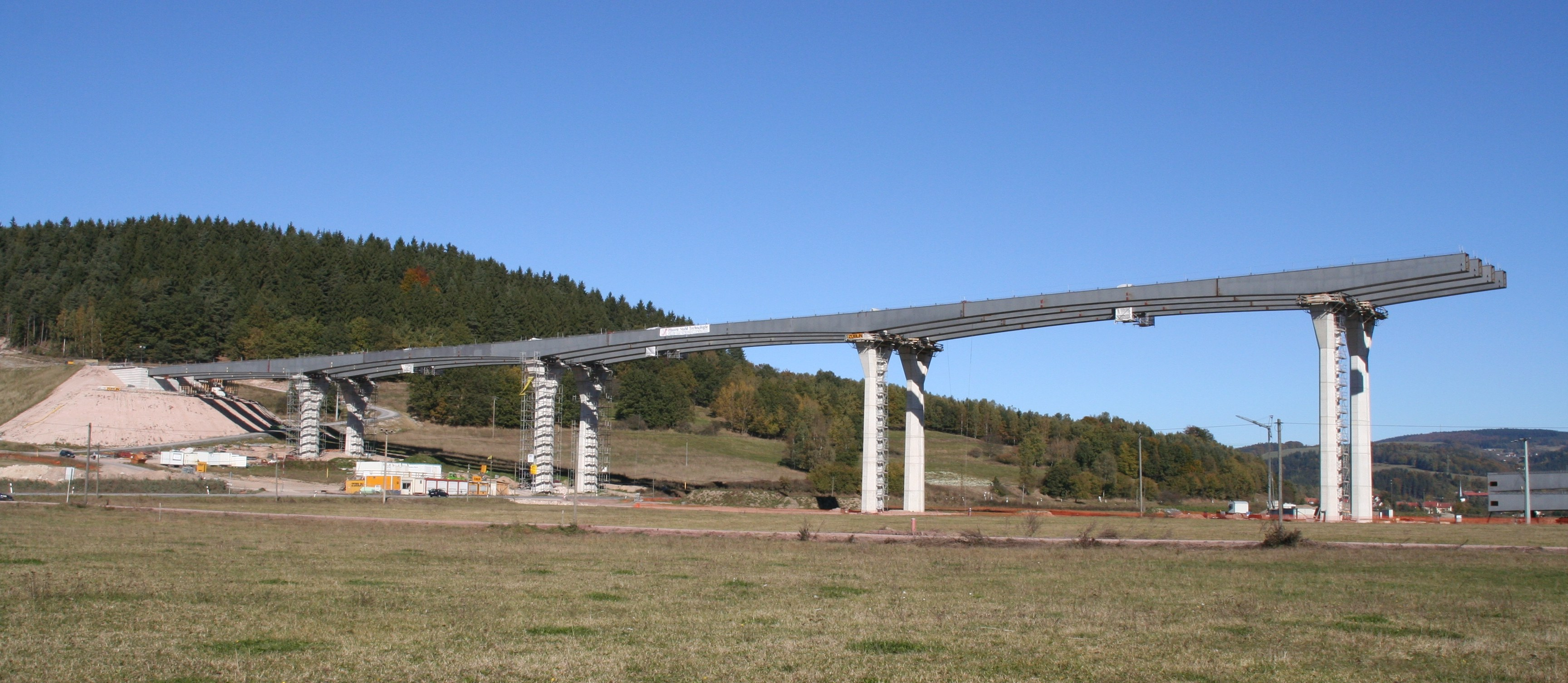 Talbrücke Schleuse Brücke der A73 bei Oberrod-Waldau